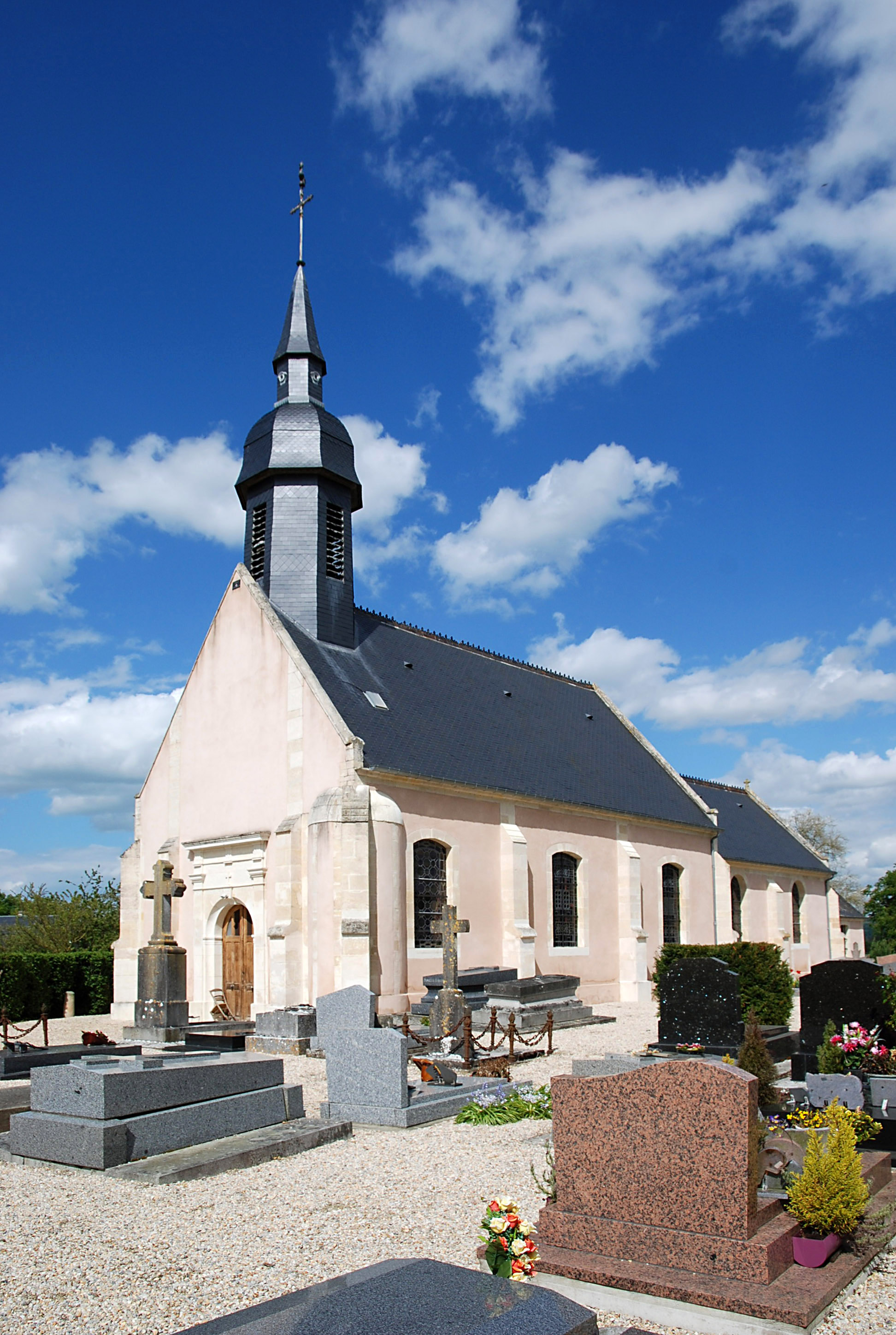 Biéville-Quétiéville (Calvados)